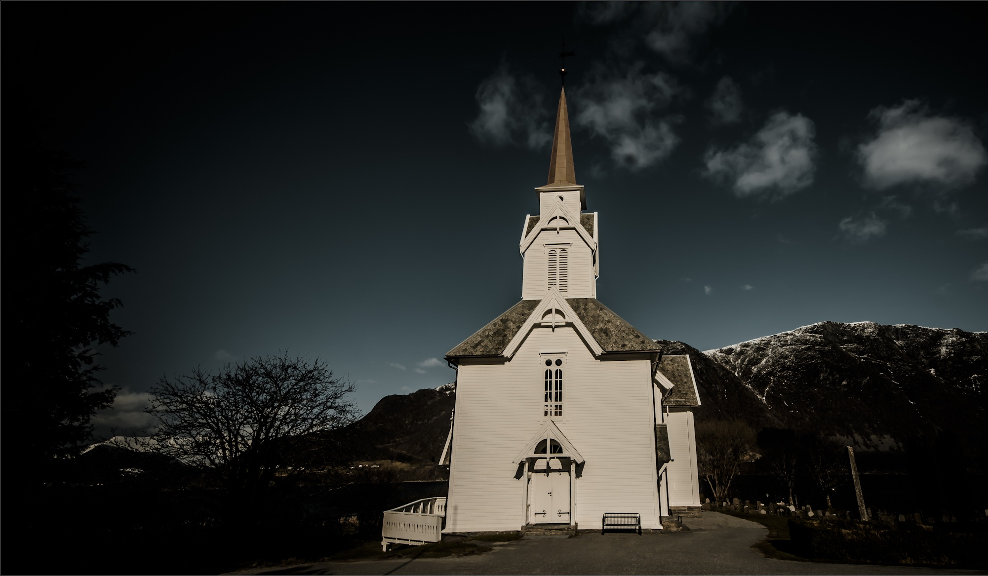 Dalsfjord kirke